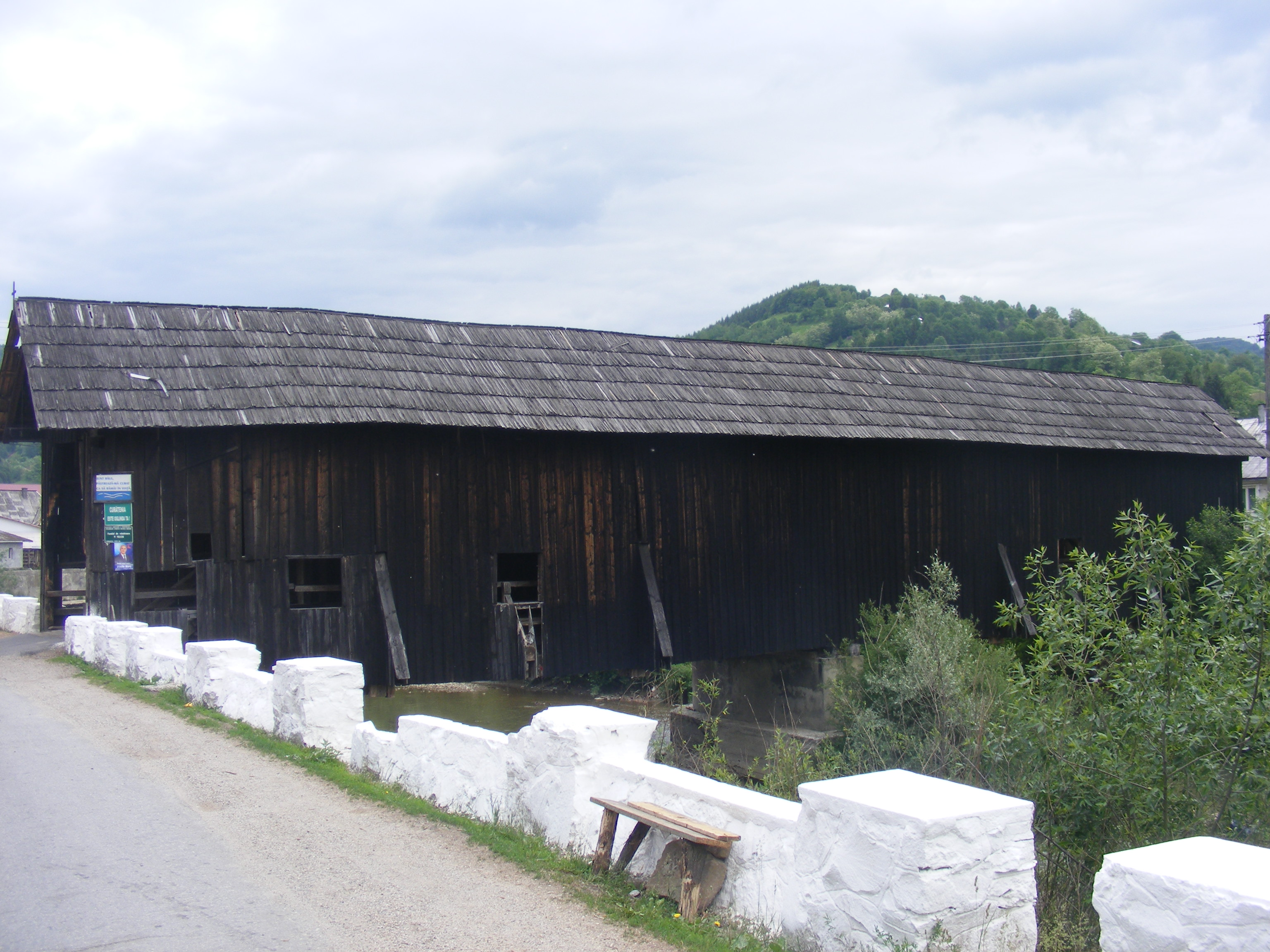 Pod acoperit din lemn ("pod grăniceresc") peste râul Sălauța